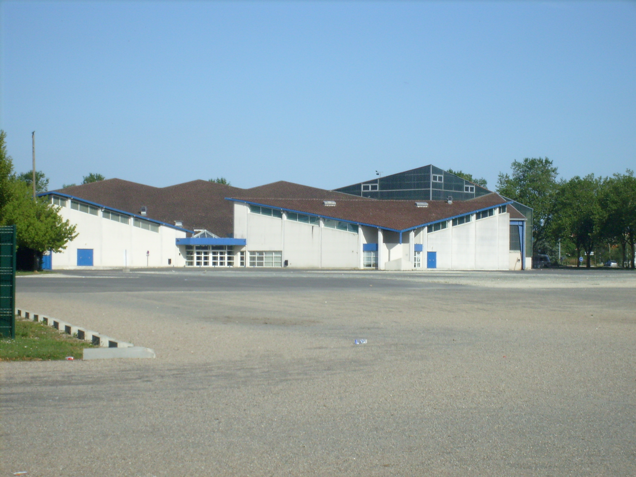 L'espace Pierre Mendès-France à Saintes